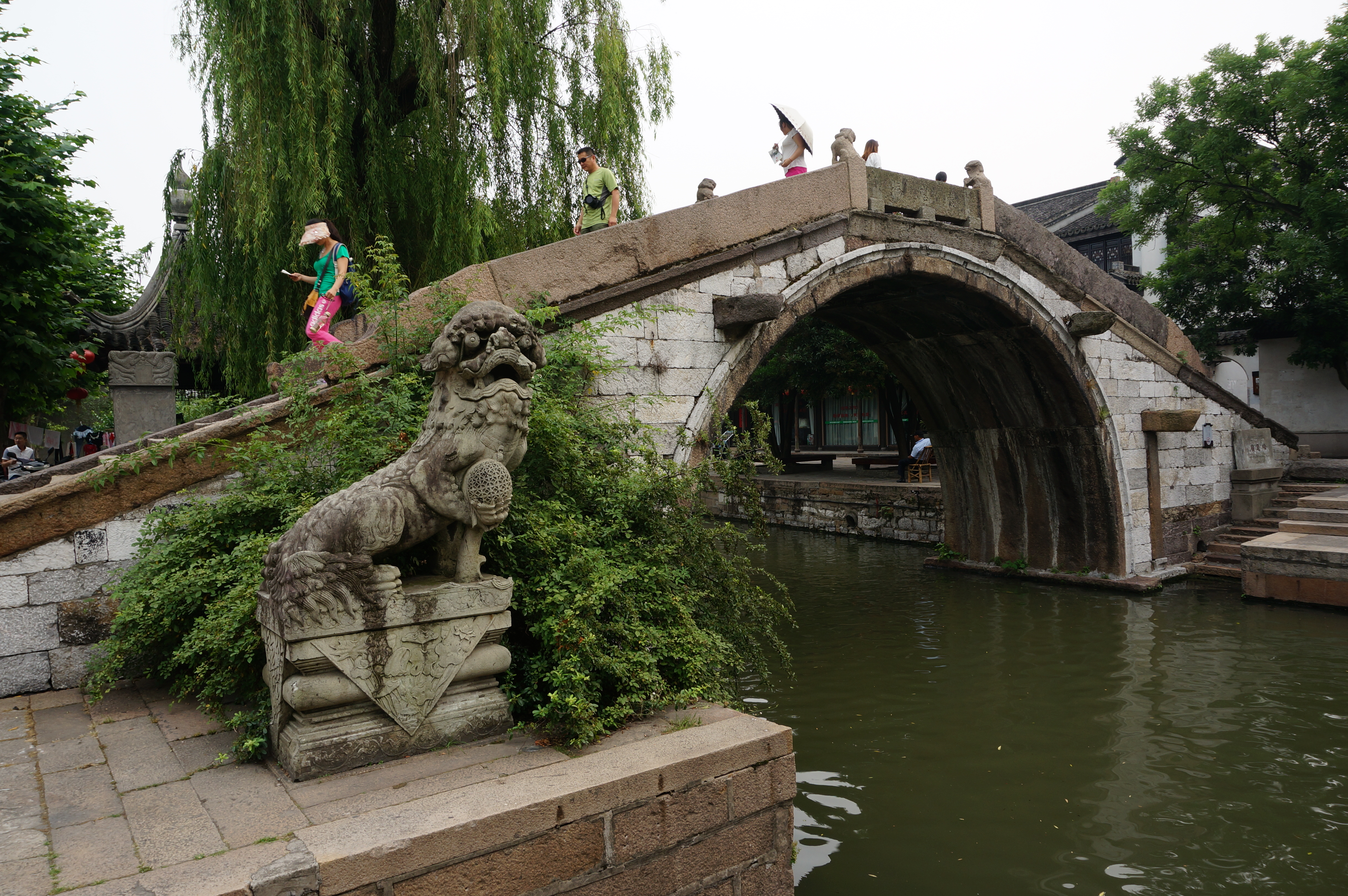 南浔广惠桥，北侧桥头。